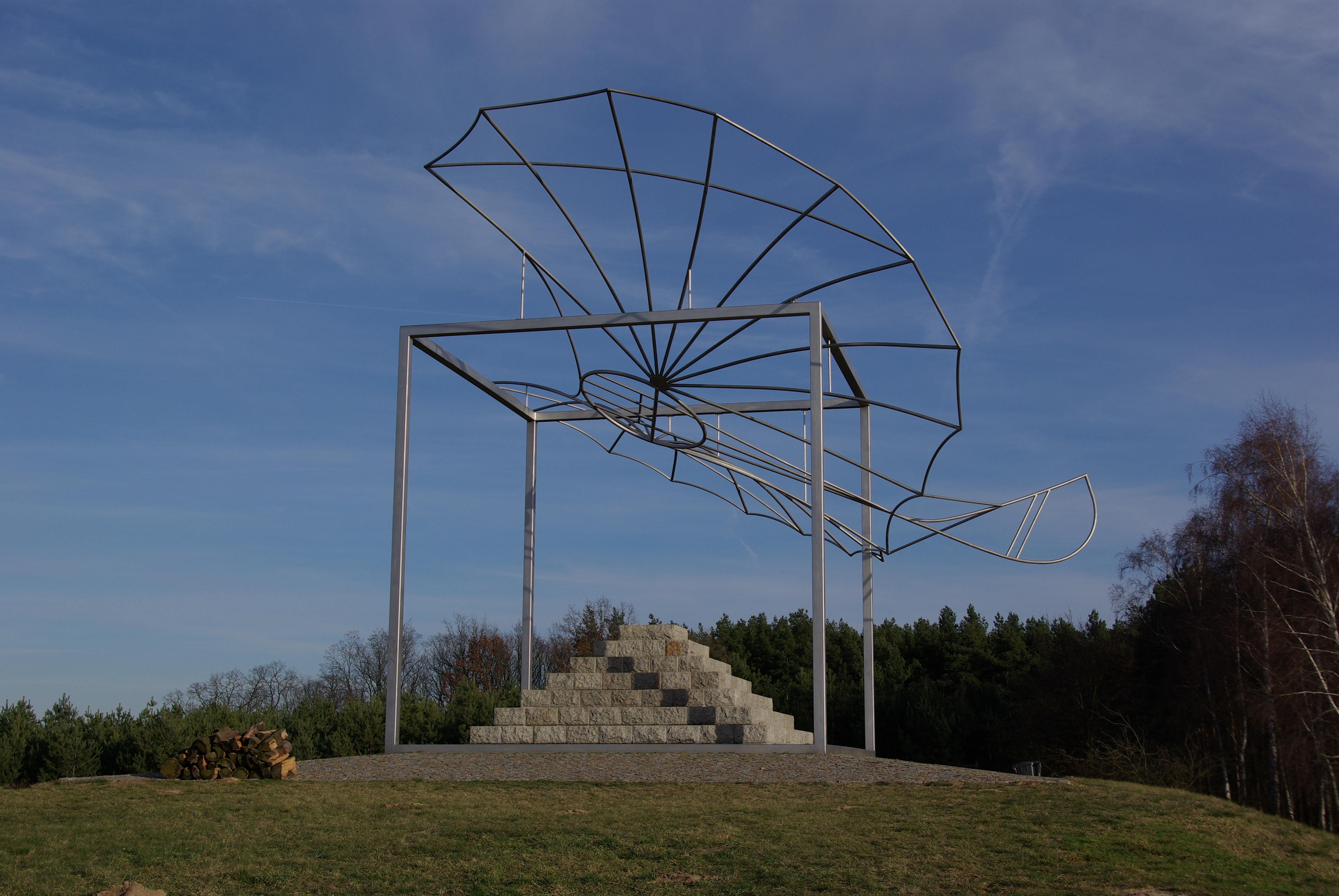 Werder (Havel) Ortsteil Derwitz. Auf dem Spitzberg fanden Versuche von Otto Lilienthal statt. Das Denkmal erinnert an diese Versuche.